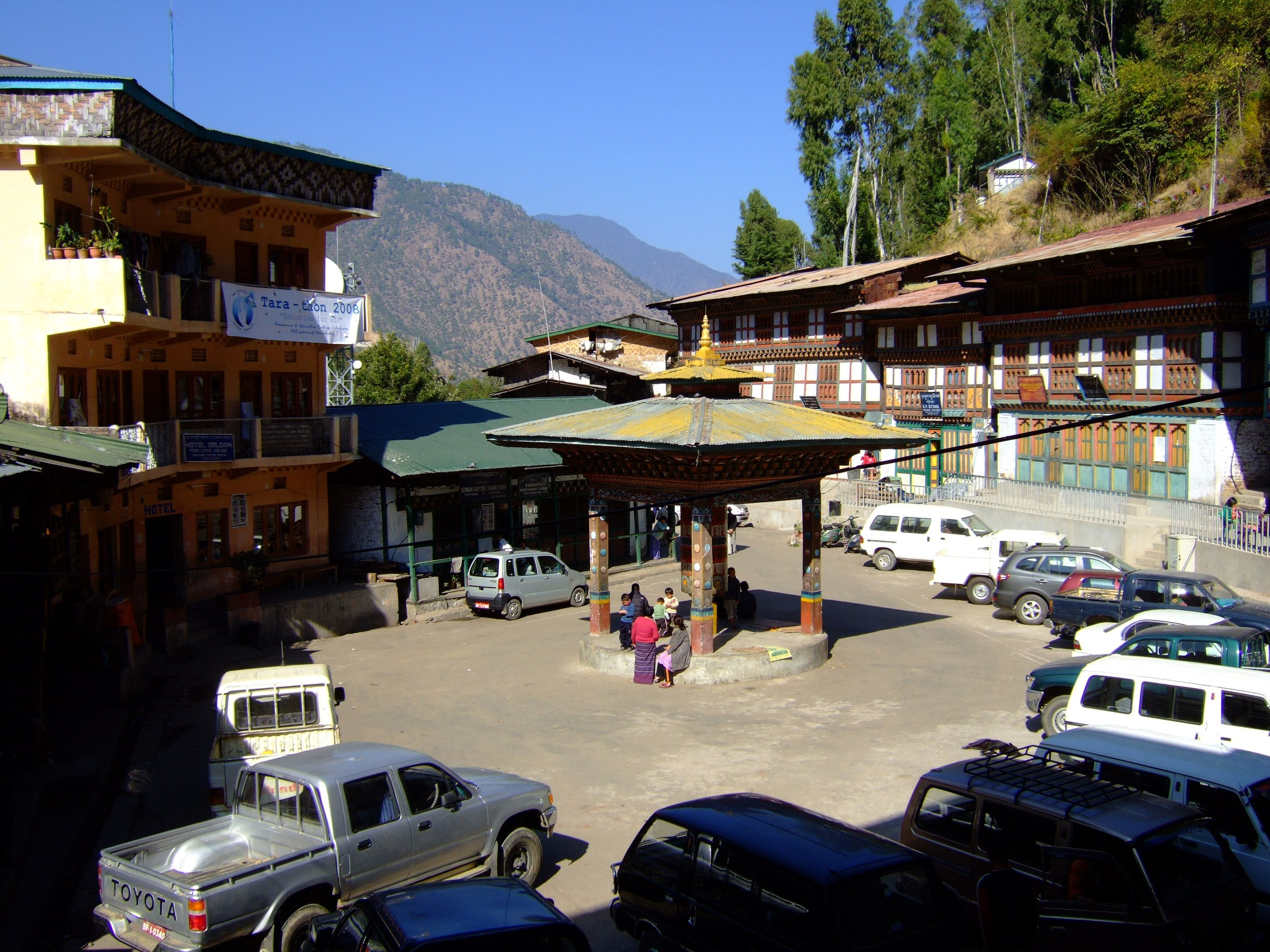 Upper market, Trashigang,Bhutan